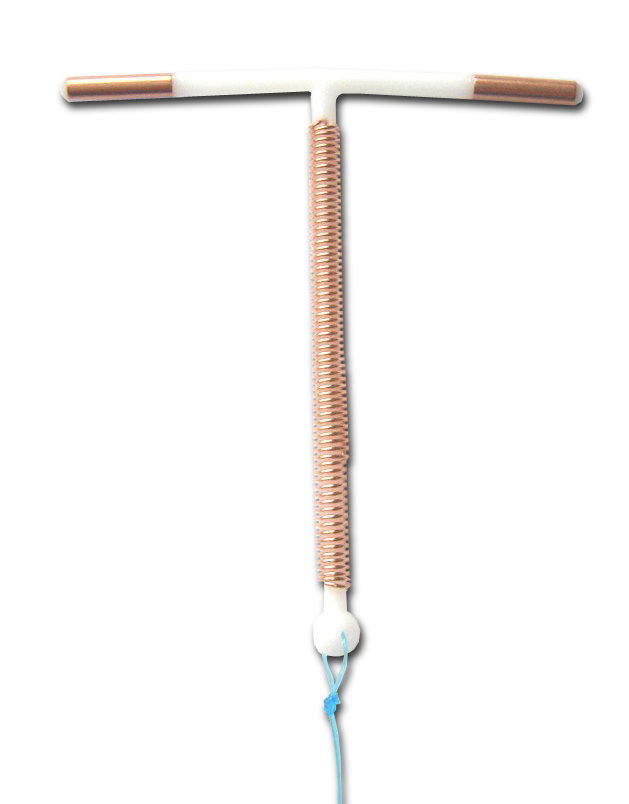 Koperhoudende anticonceptiespiraal